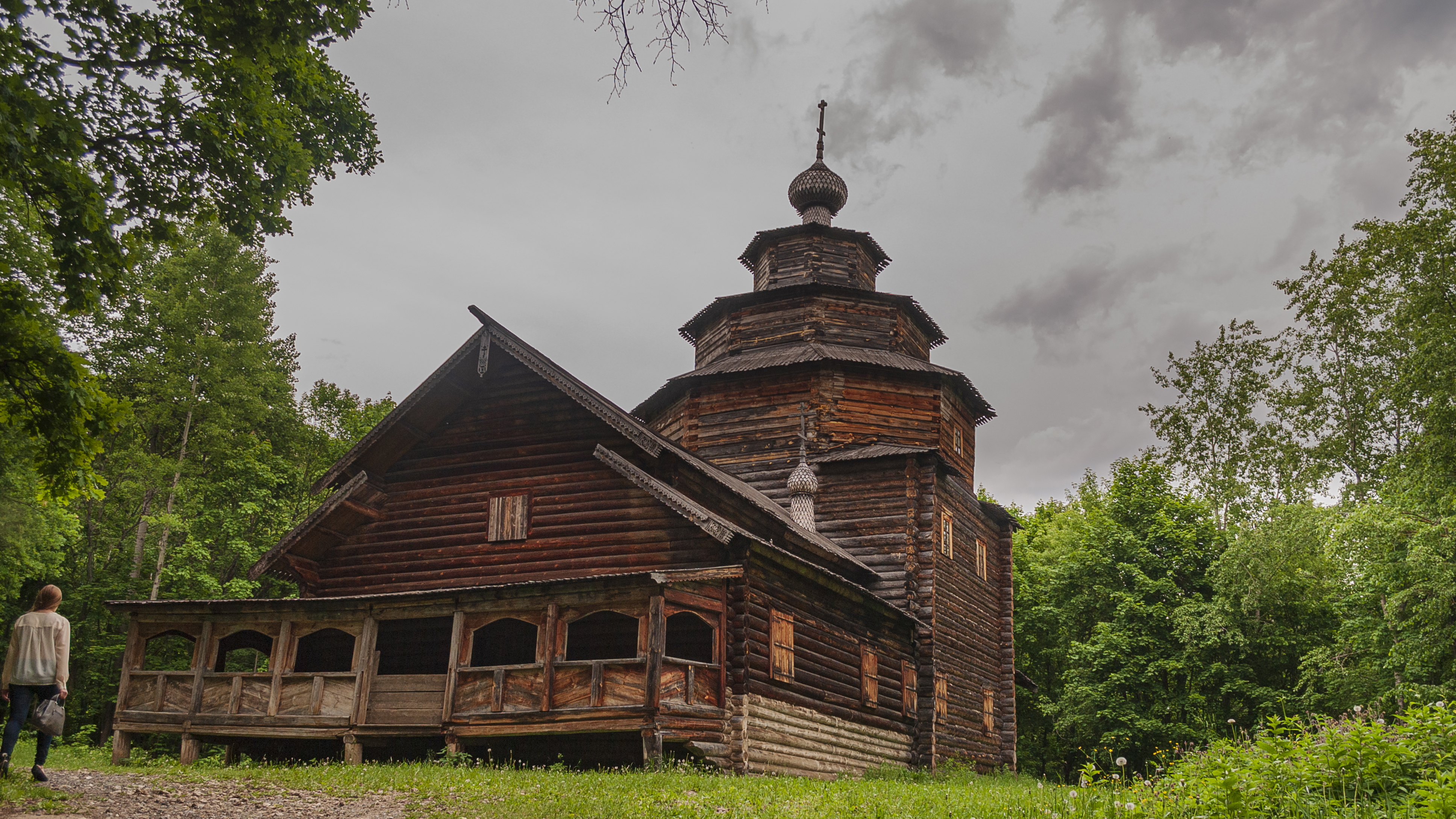 Архитектурно-этнографический музей-заповедник «Щёлоковский хутор». Церковь Покрова Пресвятой Богородицы из села Старые Ключищи